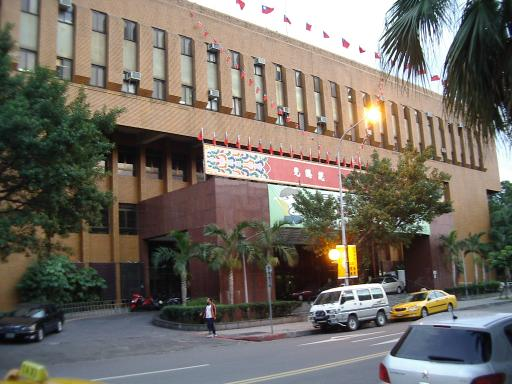 臺灣臺北地方法院Bân-lâm-gú: Tâi-uân Tâi-pak tē-hng huat-īnn. 臺灣臺北地方法院